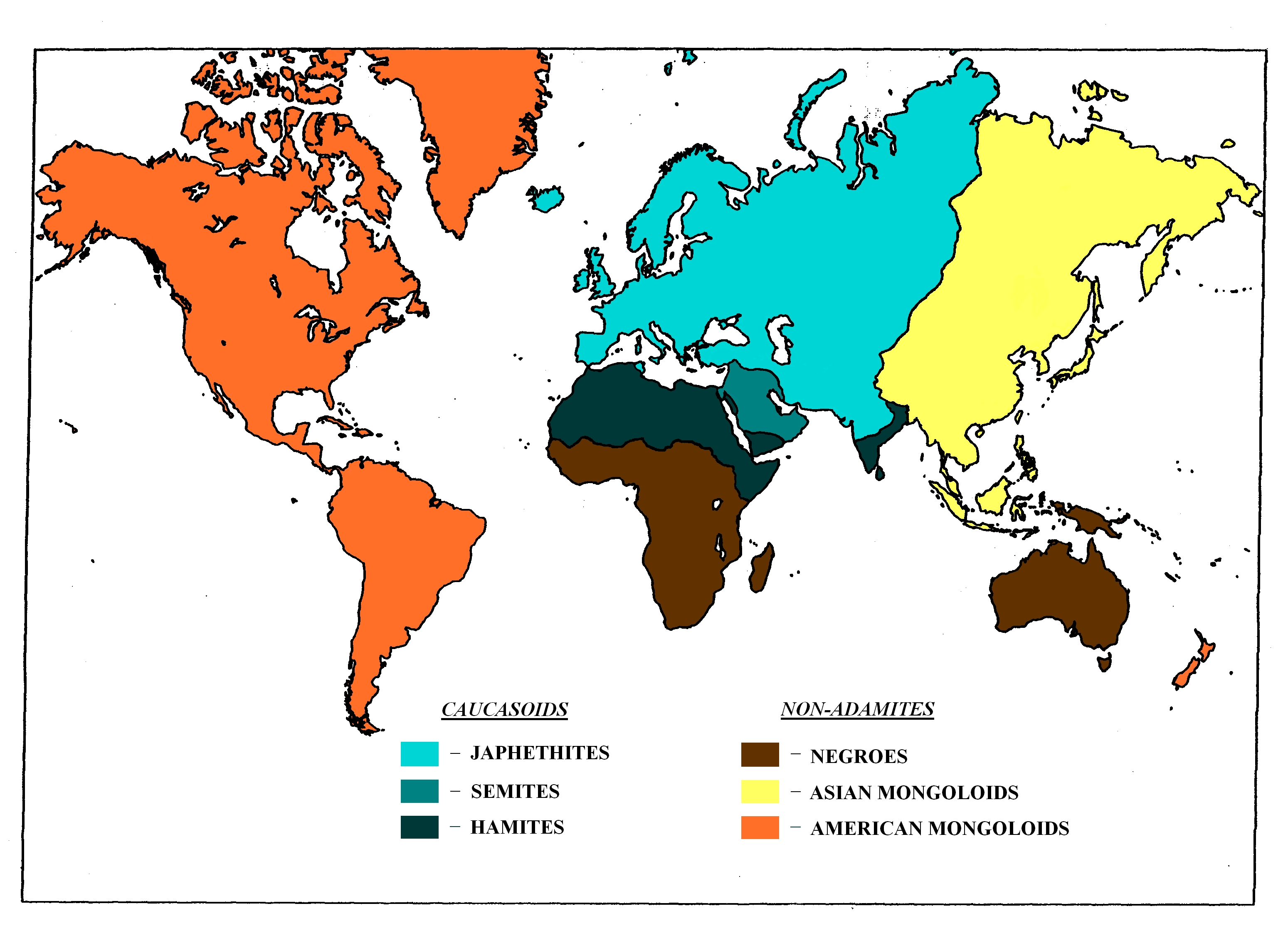 Wereldkaart met volkeren op basis van het polygenisme